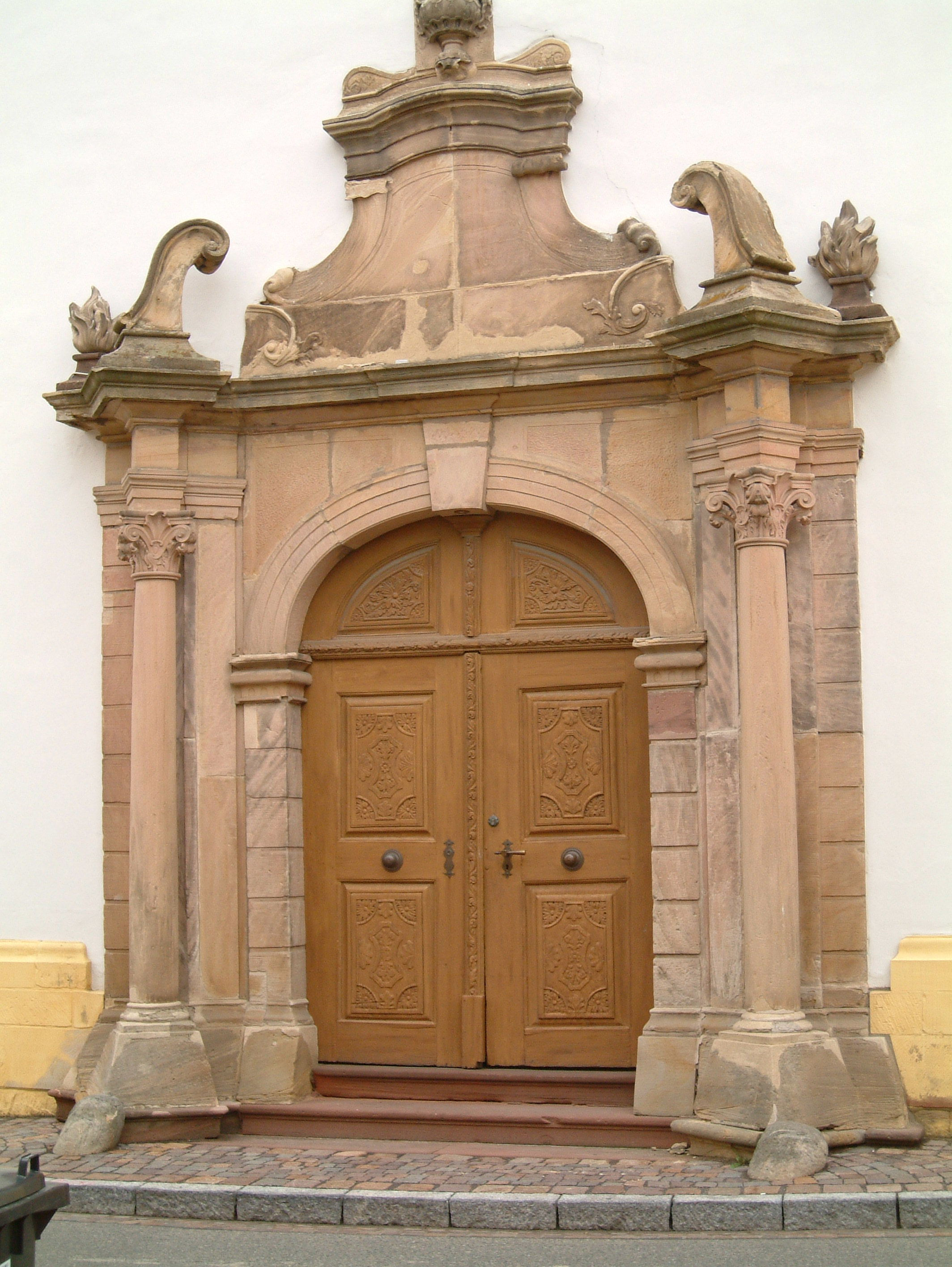 Laurentiuskirche (Westportal/prot. Teil) zu Dirmstein